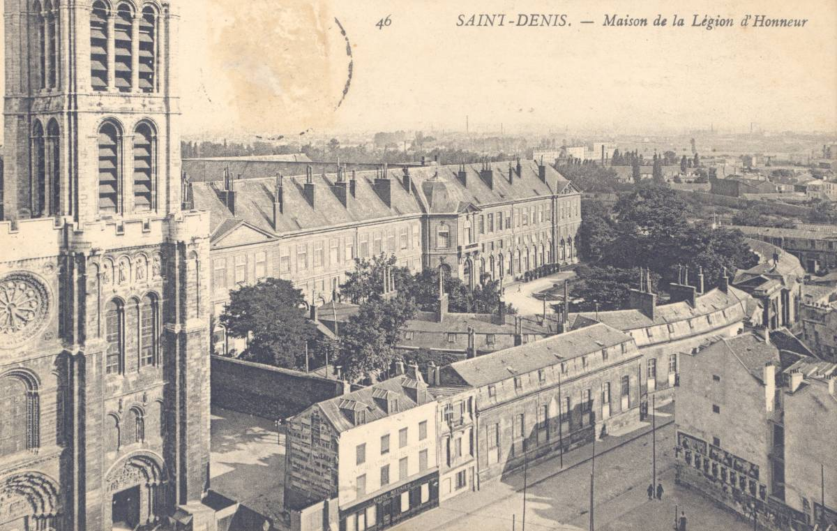 Carte postale de la maison de la Légion d'Honneur, Saint-Denis.